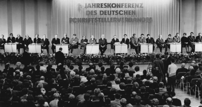 Zentralbild Franke 2.11.1966 Berlin: Schriftstellerlesung am Vorabend der Jahreskonferenz der DSV "Meine Liebste Seite" war das Motto der Schriftstellerlesung am 1.11.1966, dem Vorabend der Jahreskonferenz des Deutschen Schriftstellerverbandes, die zugleich den Höhepunkt und Abschluß der Solidaritätsaktion "1000 Fahrräder für Vietnam" bildete, bei der die DDR-Schriftsteller und ihre Leser Spenden im Wert von 2006 Fahrrädern aufgebracht haben. 29 bekannte Autoren hatten im Präsidium Platz genommen: (v.l.n.r.) Bruno Apitz, Helmut Baierl, Jurij Brezan, Eduard Claudius, Günter Deicke, Walter Gorrish, Otto Gotsche, Harald Hauser, Stephan Hermlin, Wolfgang Joho, Günter Kunert, Alfred Kurella, Hermann Kant, Paul Wiens, Herbert Nachbar, Erik Neutsch, Dieter Noll, Benno Pludra, Brigitte Reimann, Helmut Sakowski, Rosemarie Schuder, Max Walter Schulz, Bernhard Seeger sowie (nicht im Bild) Anna Seghers, Fritz Selbmann, Kurt Stern, Michael Tschesno-Hell, Inge von Wangenheim und Max Zimmering.